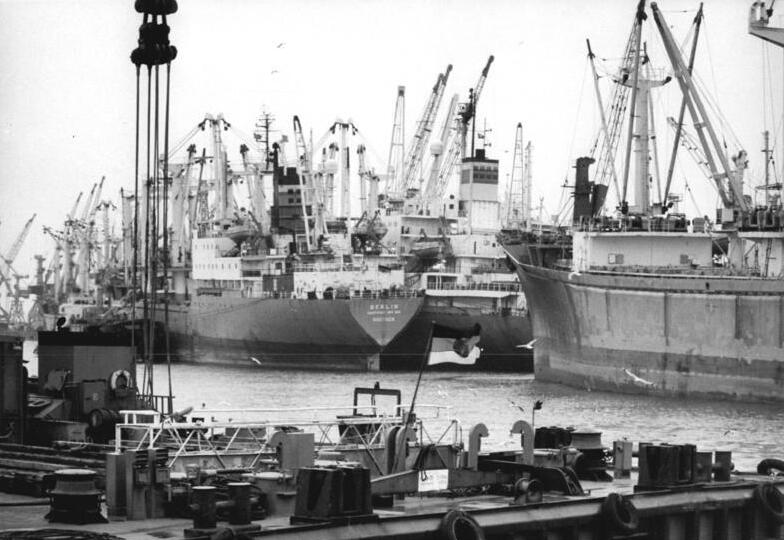 Rostock, Überseehafen, Frachter ADN-ZB Sindermann 25.12.88-tre - Rostock: Güterumschlag an den Weihnachtsfeiertagen - Die Seeleute von über 40 Tankern, Massengutfrachtern, Containerschiffen unter vielen internationalen Flaggen werde die Weihnachtsfeiertage im Rostocker Überseehafen verbringen. Bereits einen Tag vor dem Weihnachtsfest war mit dem Umschlag von über 20, 3 Millionen Tonnen Gütern der bisherige Jahresumschlagrekord von 1982 erreicht worden. Bis Jahresende wollen die Rostocker noch weitere 500.000 Tonnen bewältigen.